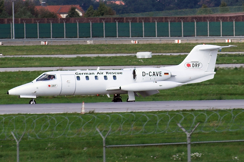 Deutsche Rettungsflugwacht / German Air Rescue Learjet 35A (D-CAVE)